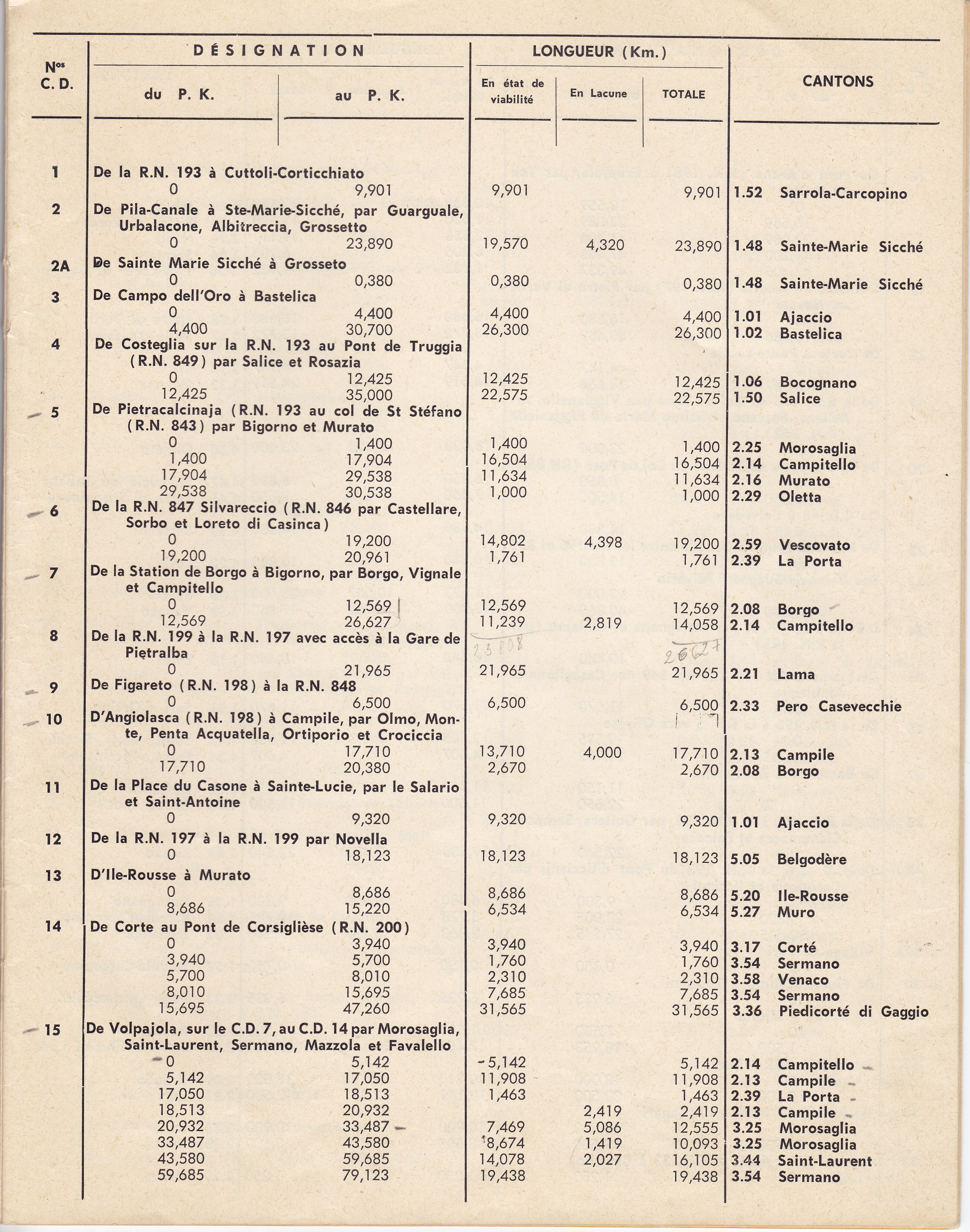 archives oersonnelles